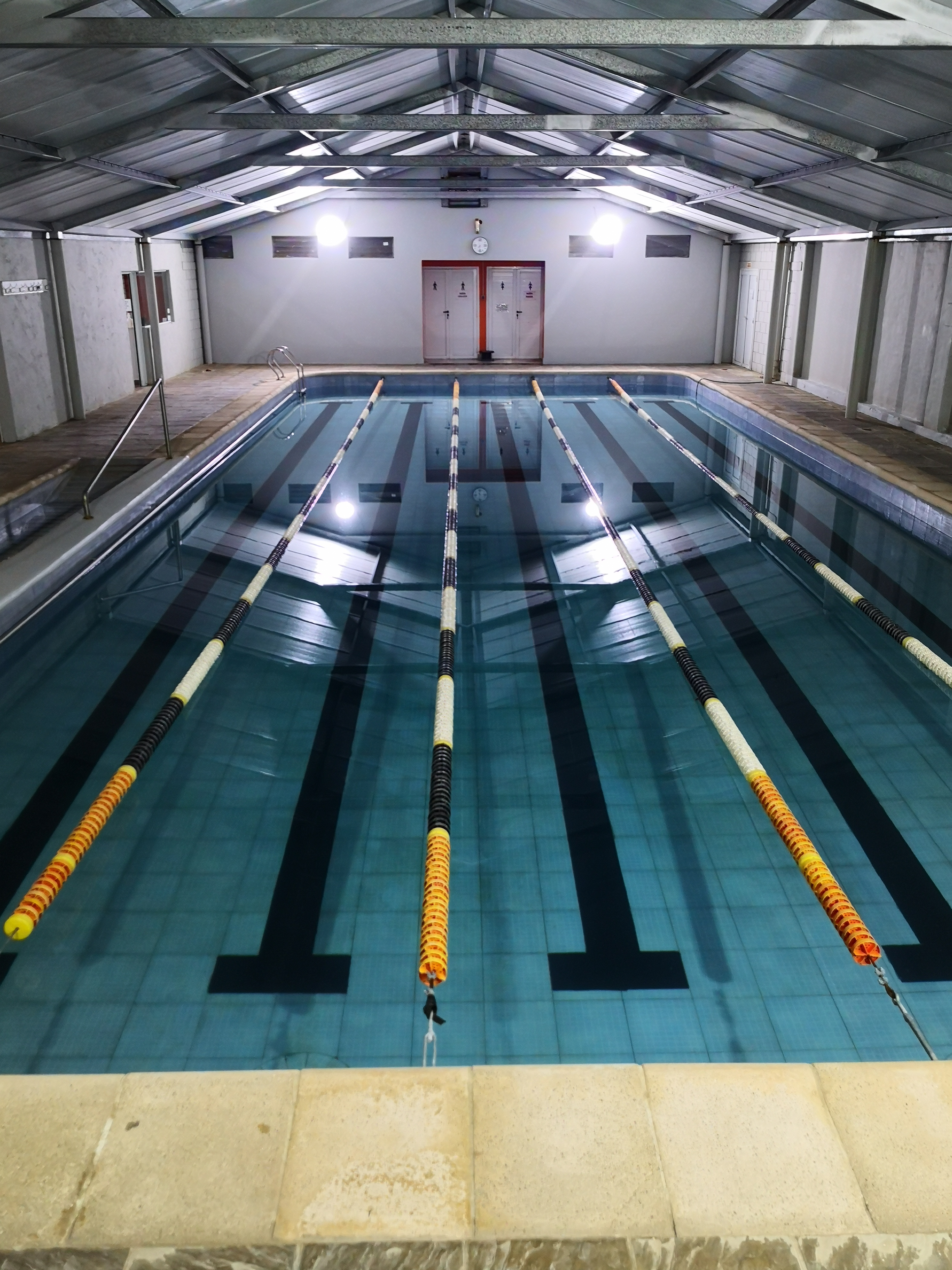 Pileta climatiza Deheza FootBall Club